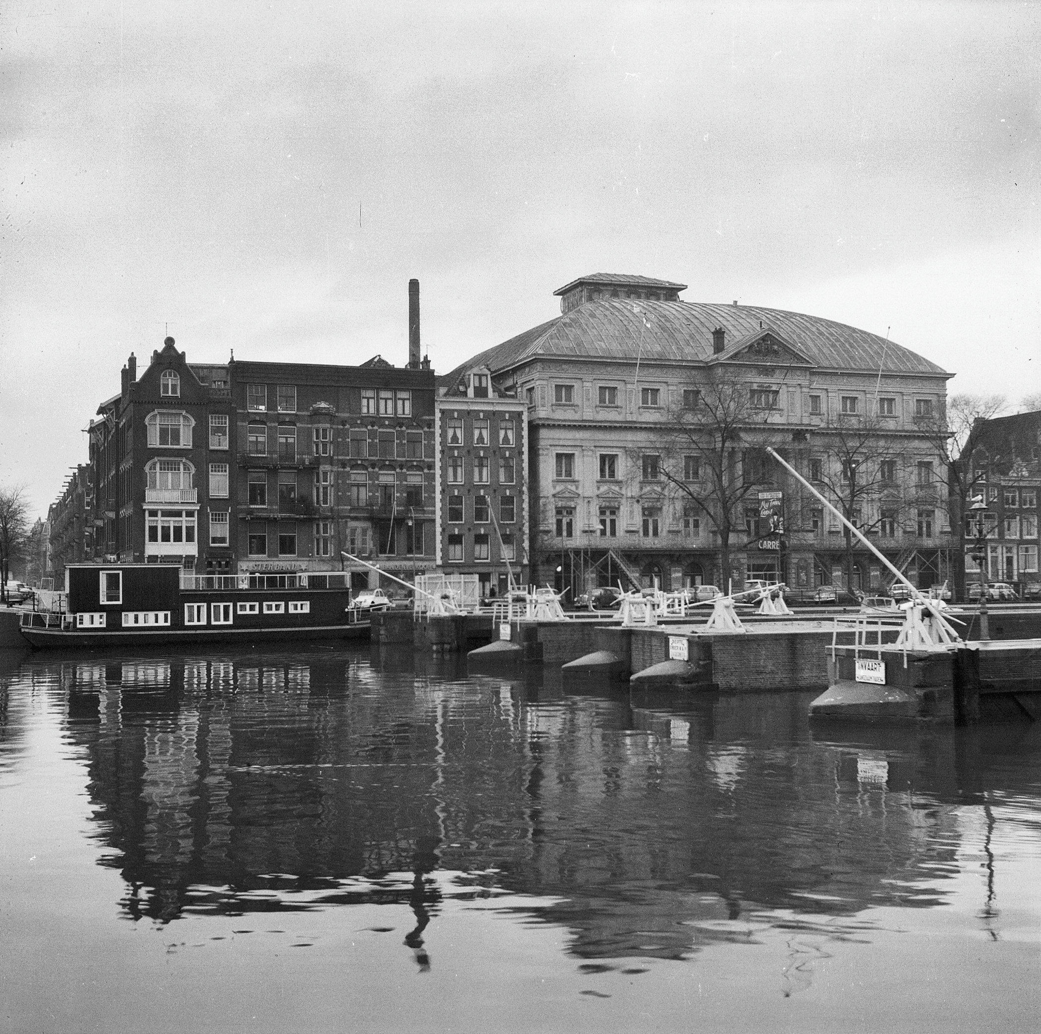 Theater Carre